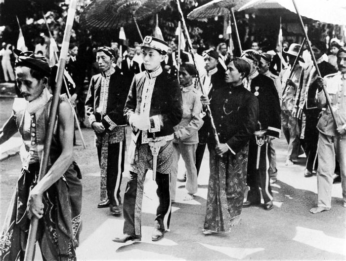 Repronegatief. De regent van Surabaya, Raden Tumenggung Musono, loopt opweg naar zijn installatie het gouverneurserf op en wordt vergezeld door patih en wedono's in gala-tenue